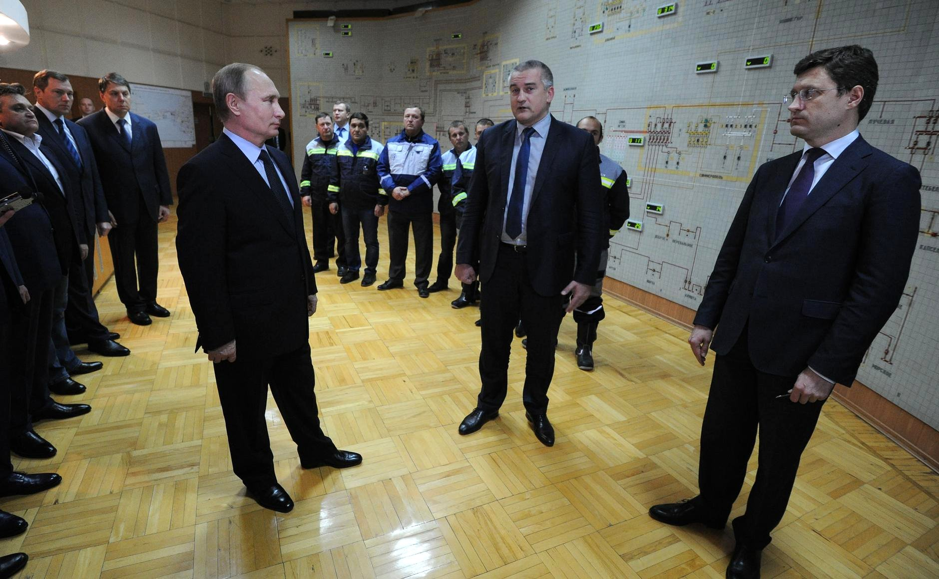 Владимир Путин принял участие в запуске первой очереди энергомоста в Крым. С Министром энергетики России Александром Новаком (справа) и Главой Республики Крым Сергеем Аксёновым